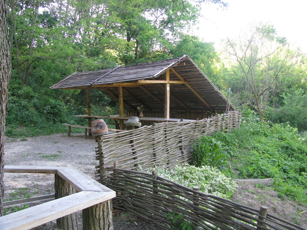 Місце для відпочинку (Мусійове джерело)